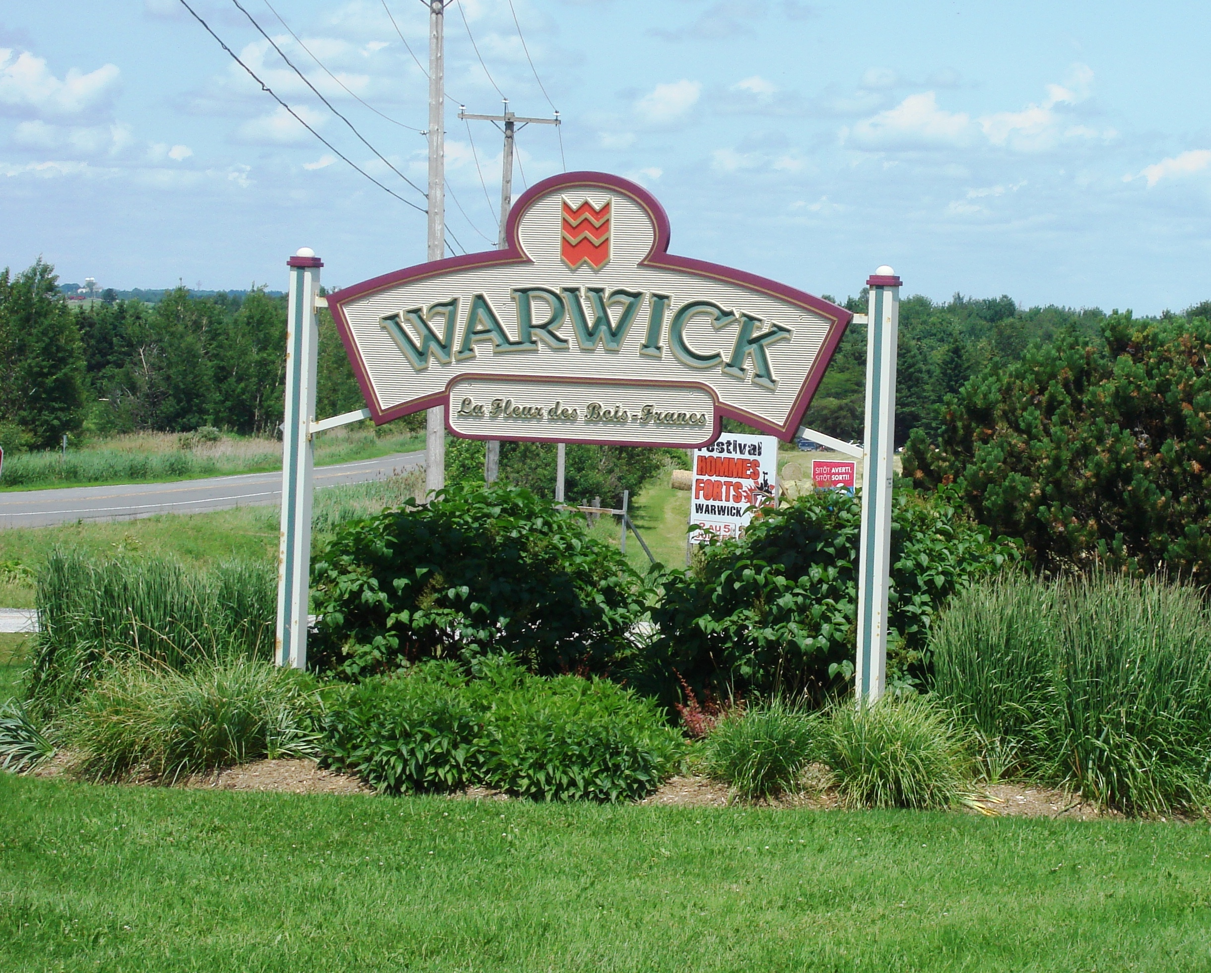 Bienvenue à Warwick